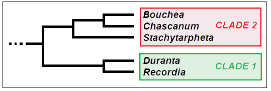 Duranteae_-_Cladogramma_della_tribù